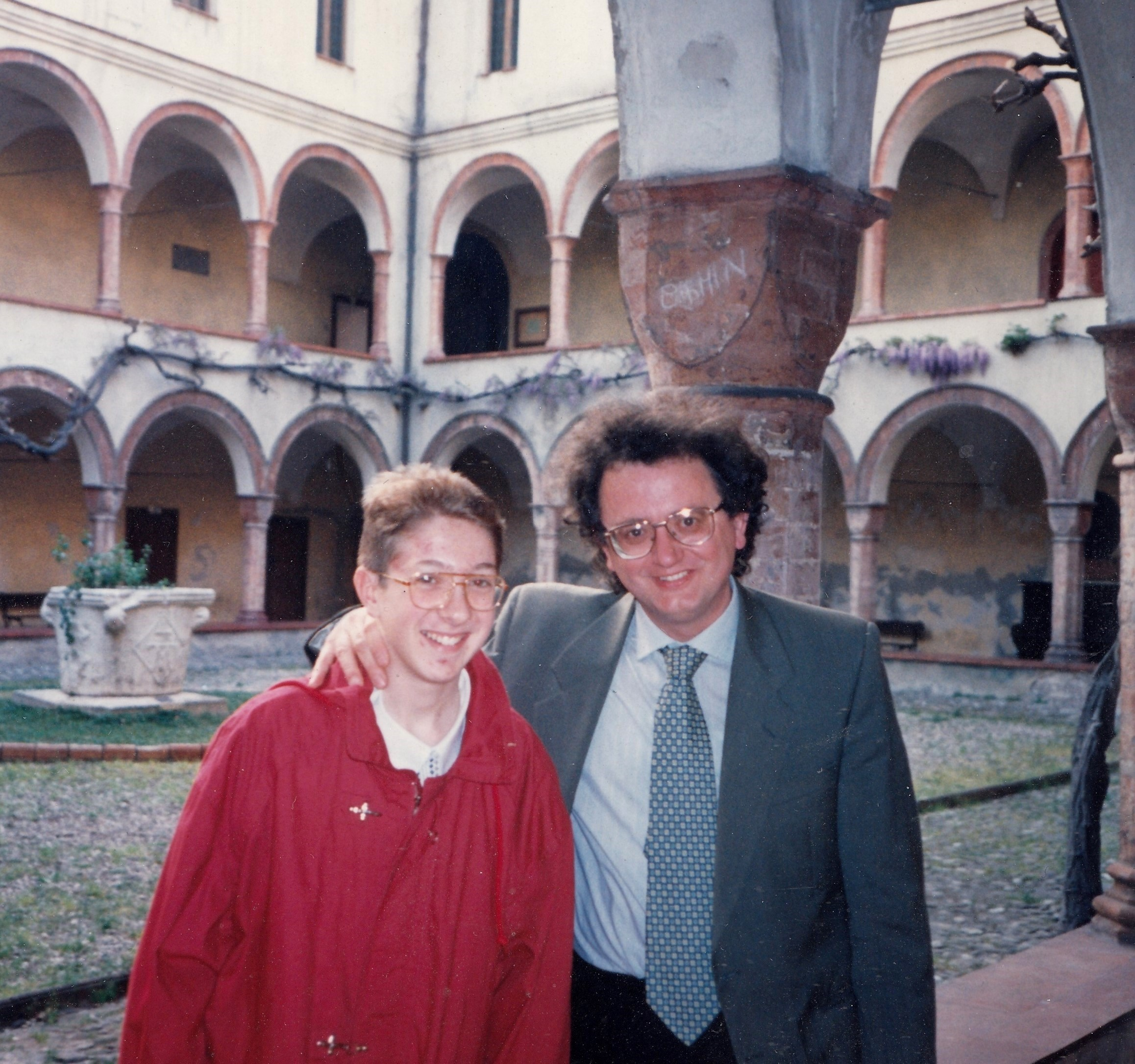 Orlando Calevro con il suo giovane allievo di pianoforte Mattia Peli - Conservatorio di Musica "A. Boito" di Parma, 1994